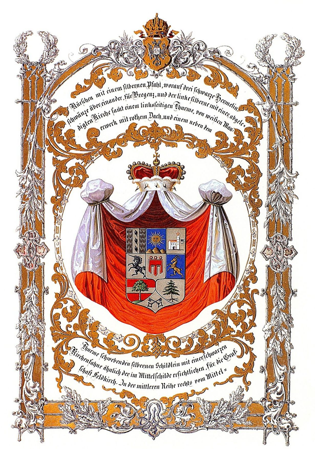 Auszug aus der Verleihungsurkunde des "alten" Vorarlberger Wappens von 1864 geschaffen vom Historiker Joseph von Bergmann.